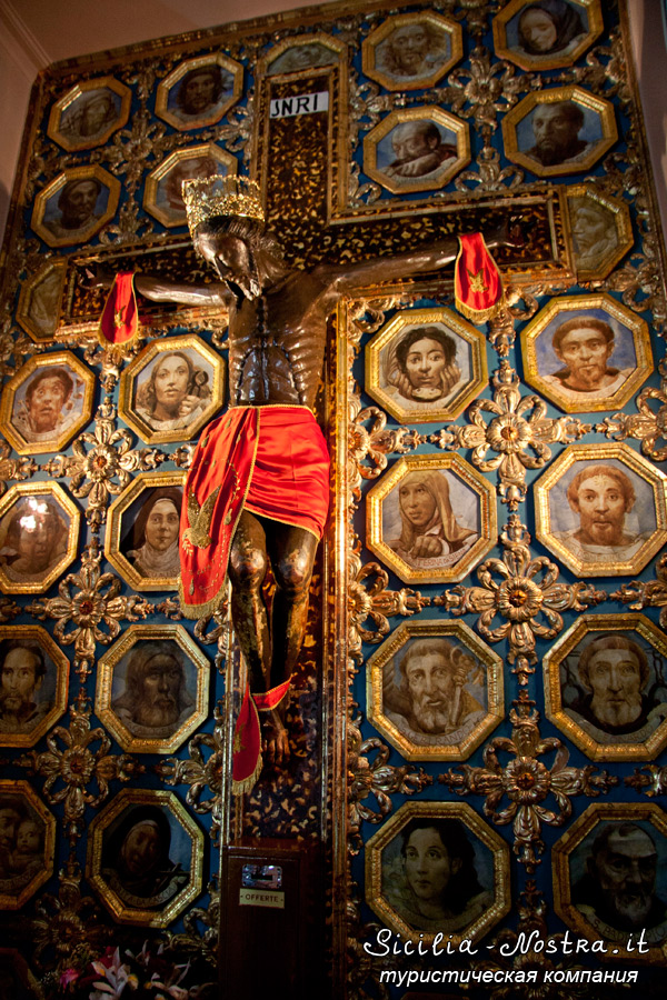 Siculiana